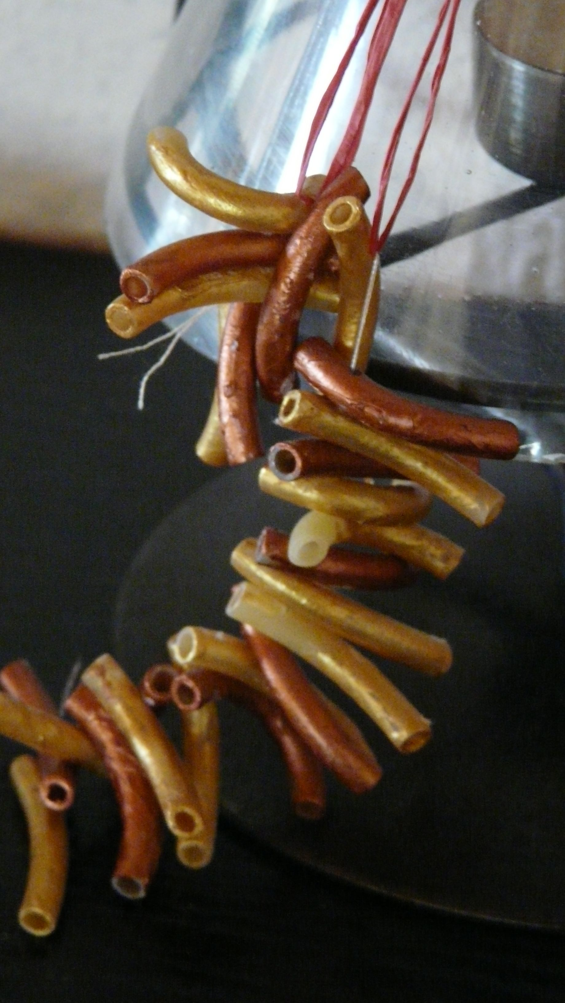 Pasta necklace